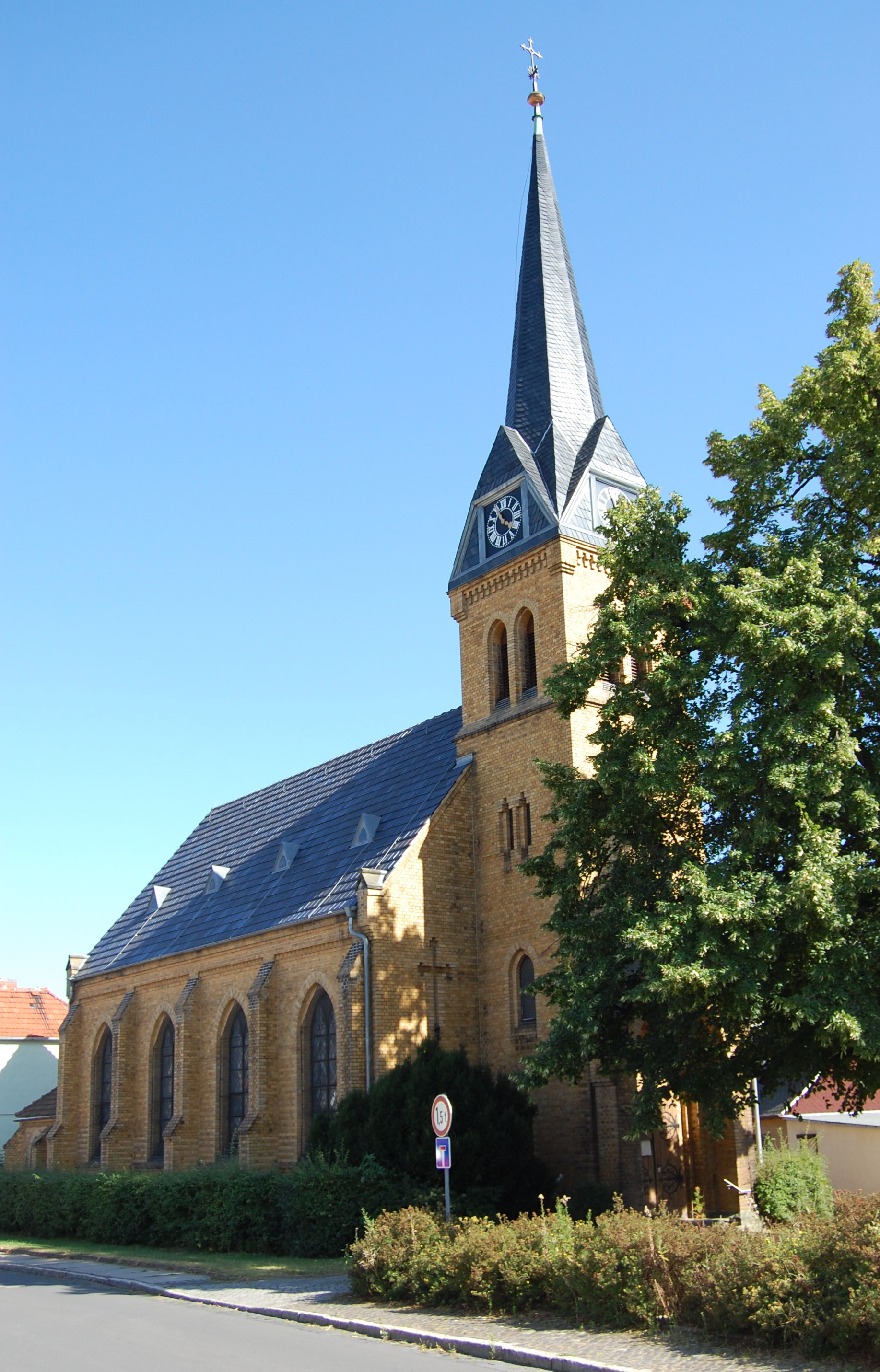 Sankt Petrikirche in Opperode